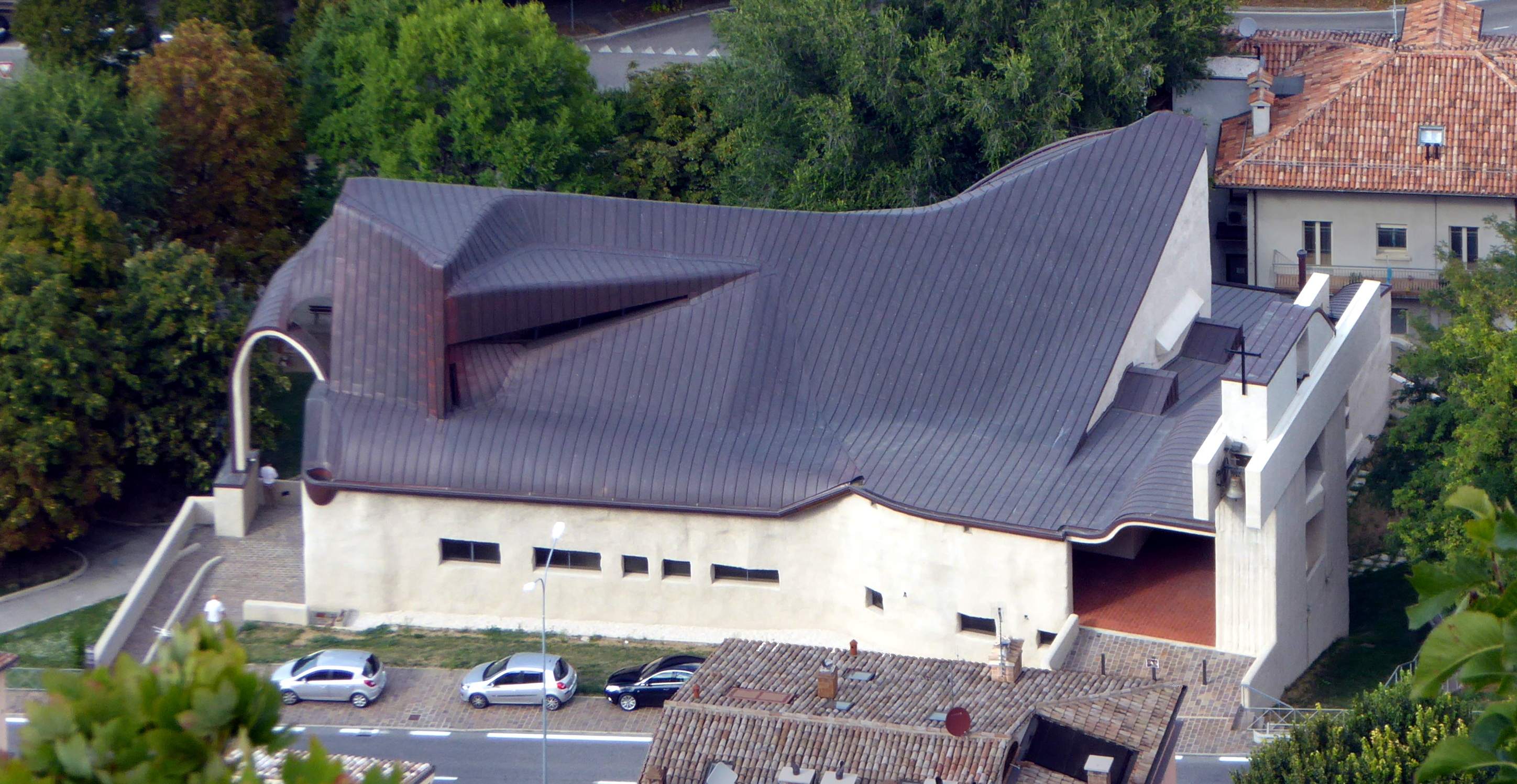 Die Kirche der seligen Jungfrau (Santuario della Beata Vergine della Consolazione) in Borgo Maggiore (San Marino); vom Monte Titano aus gesehen.